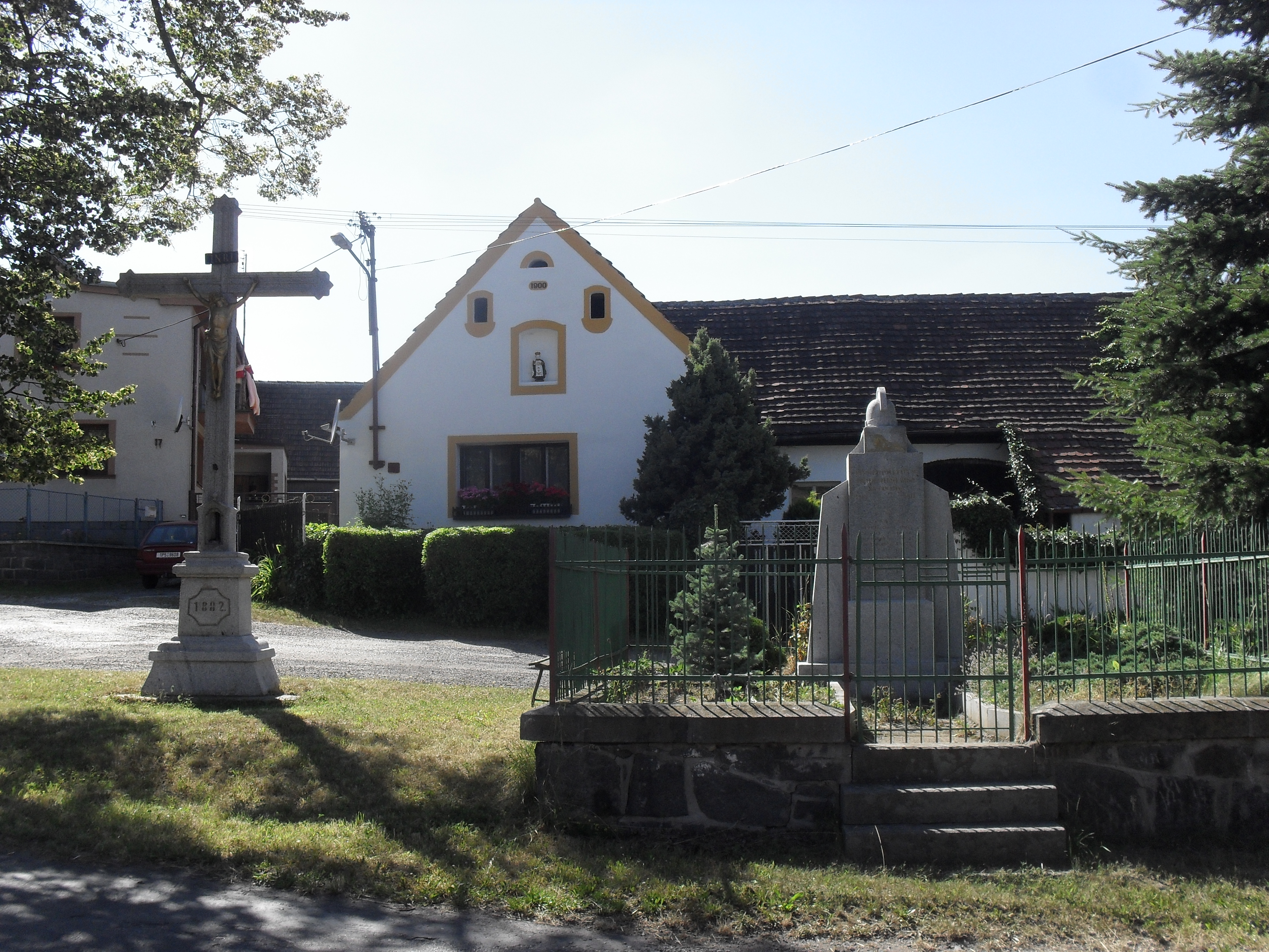 Fotografie Velešic u Pačejova.